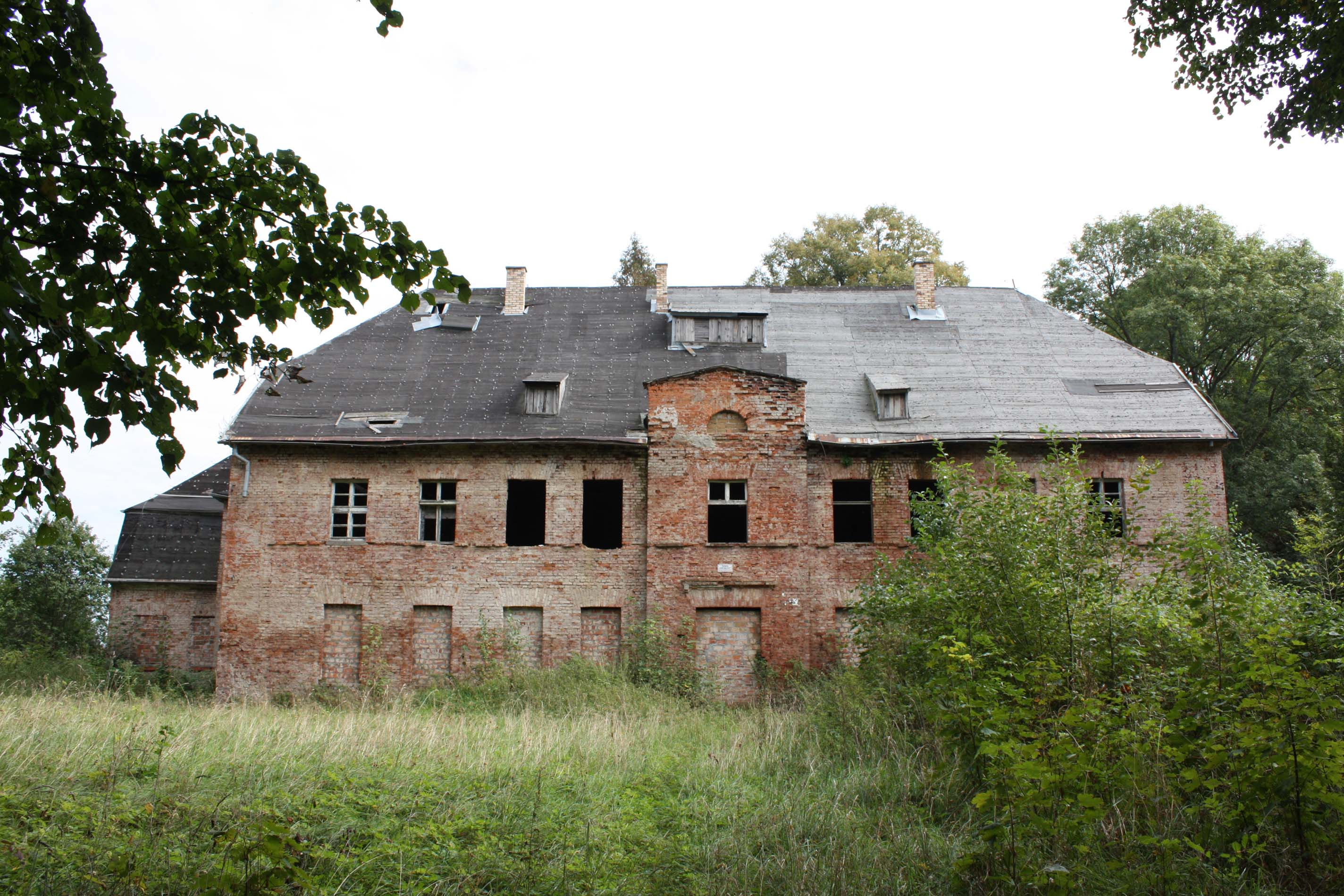 Dwór w Laskach Koszalińskich